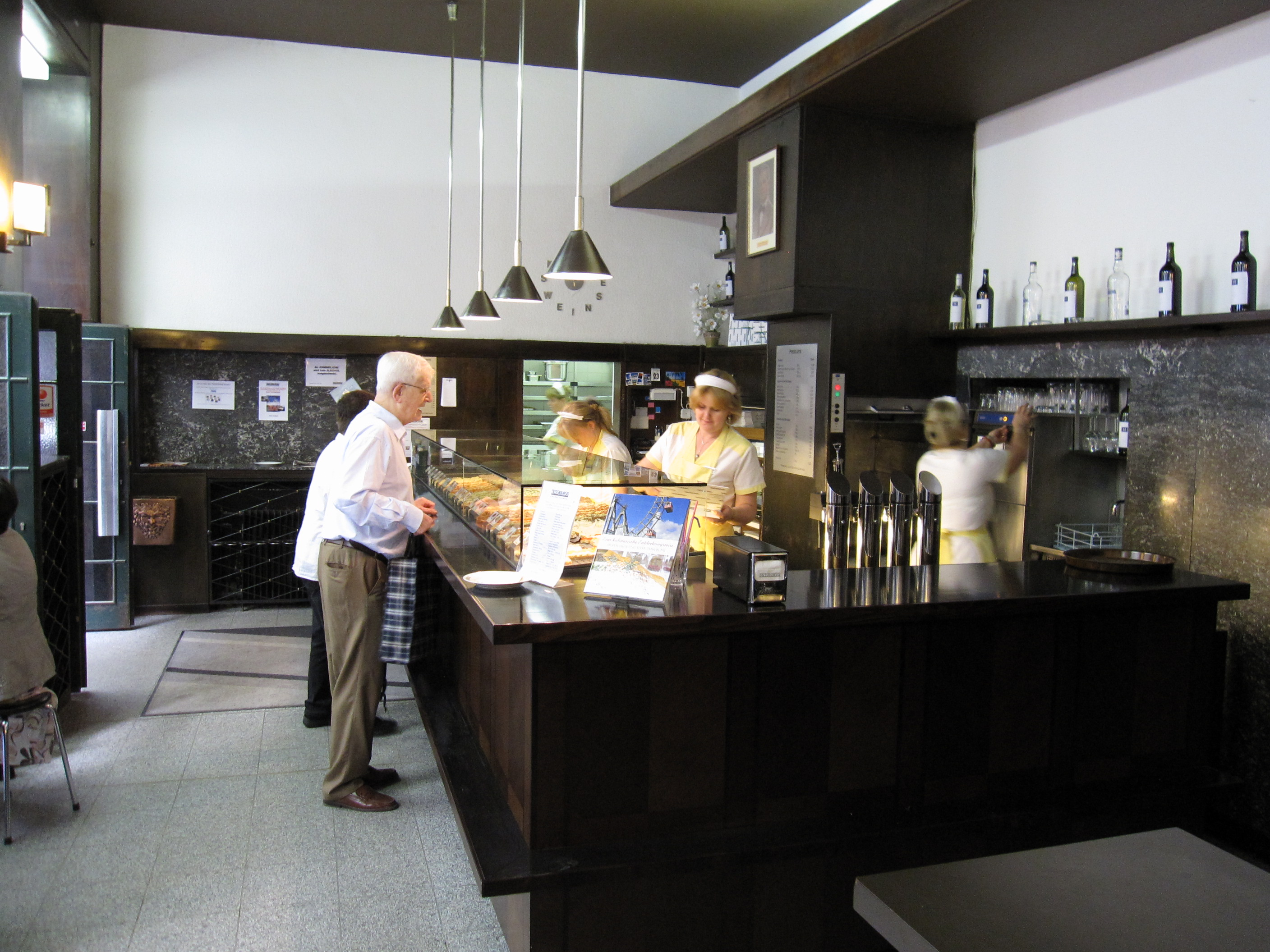 Trześniewski at Dorotheergasse, Vienna's I. district.